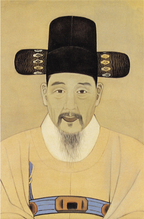 환재 박규수 영정